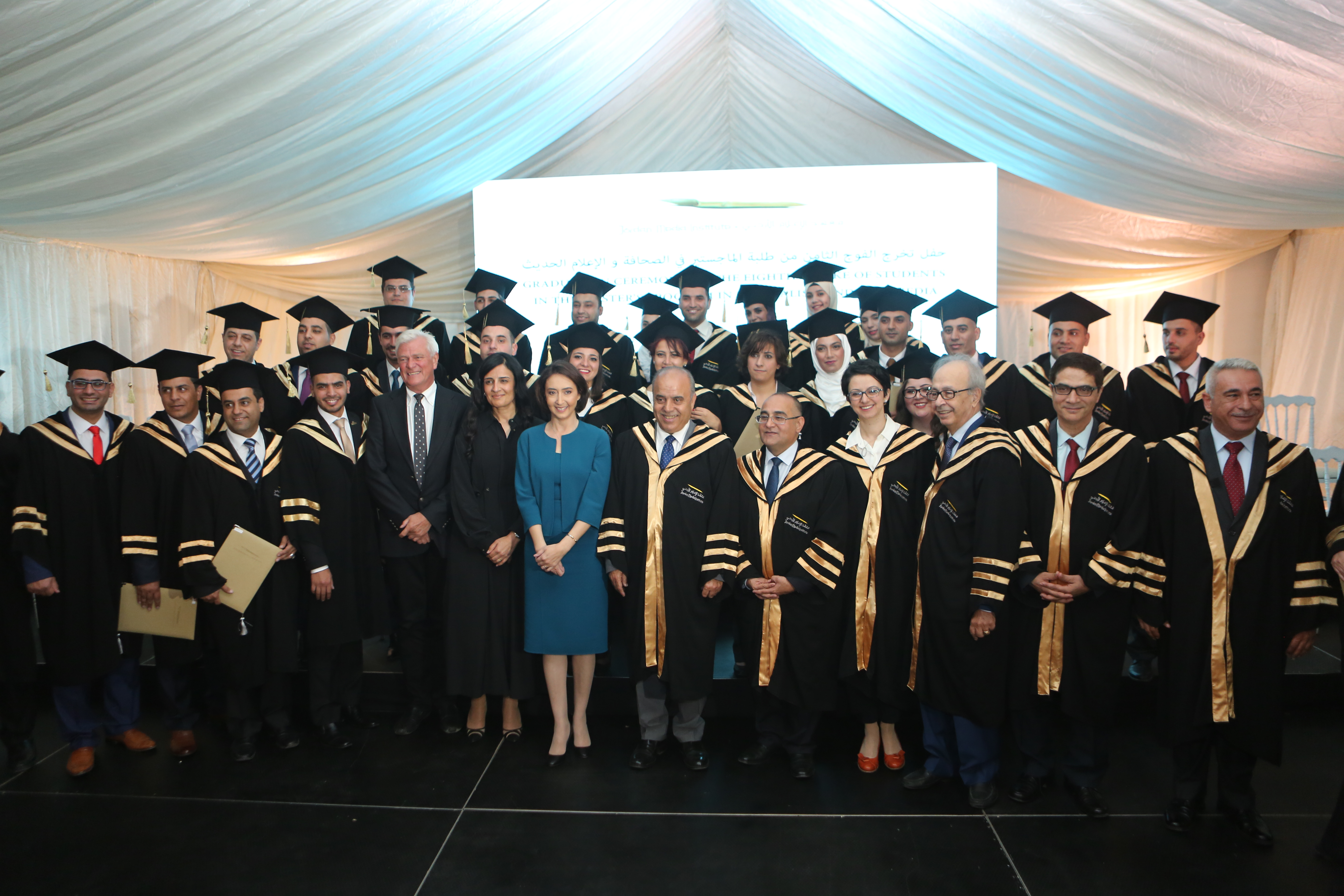 الأميرة ريم علي ترعى حفل تخرج الدفعة الثامنة من طلبة معهد الإعلام الأردني